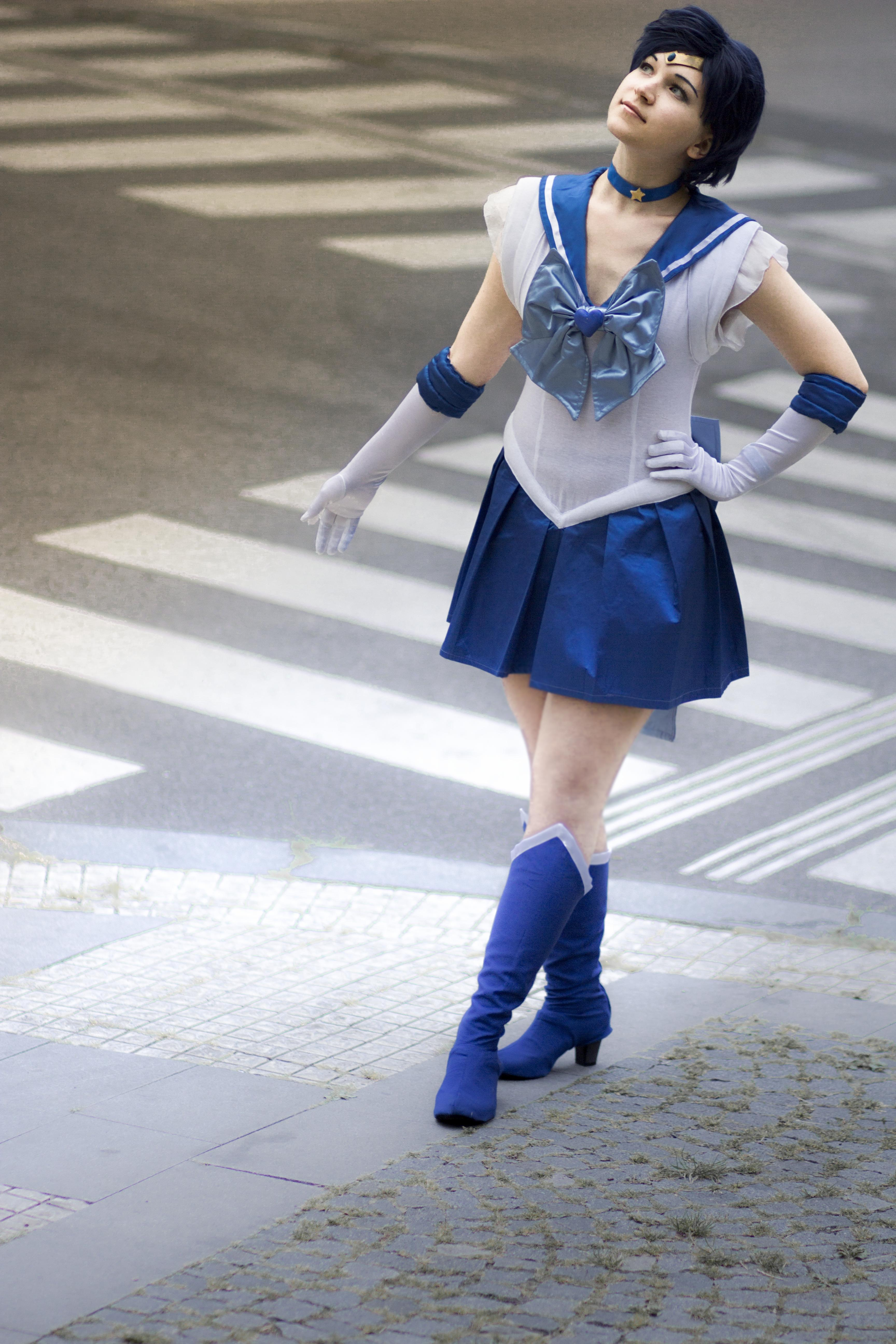 《美少女戰士》水星仙子cosplayer。